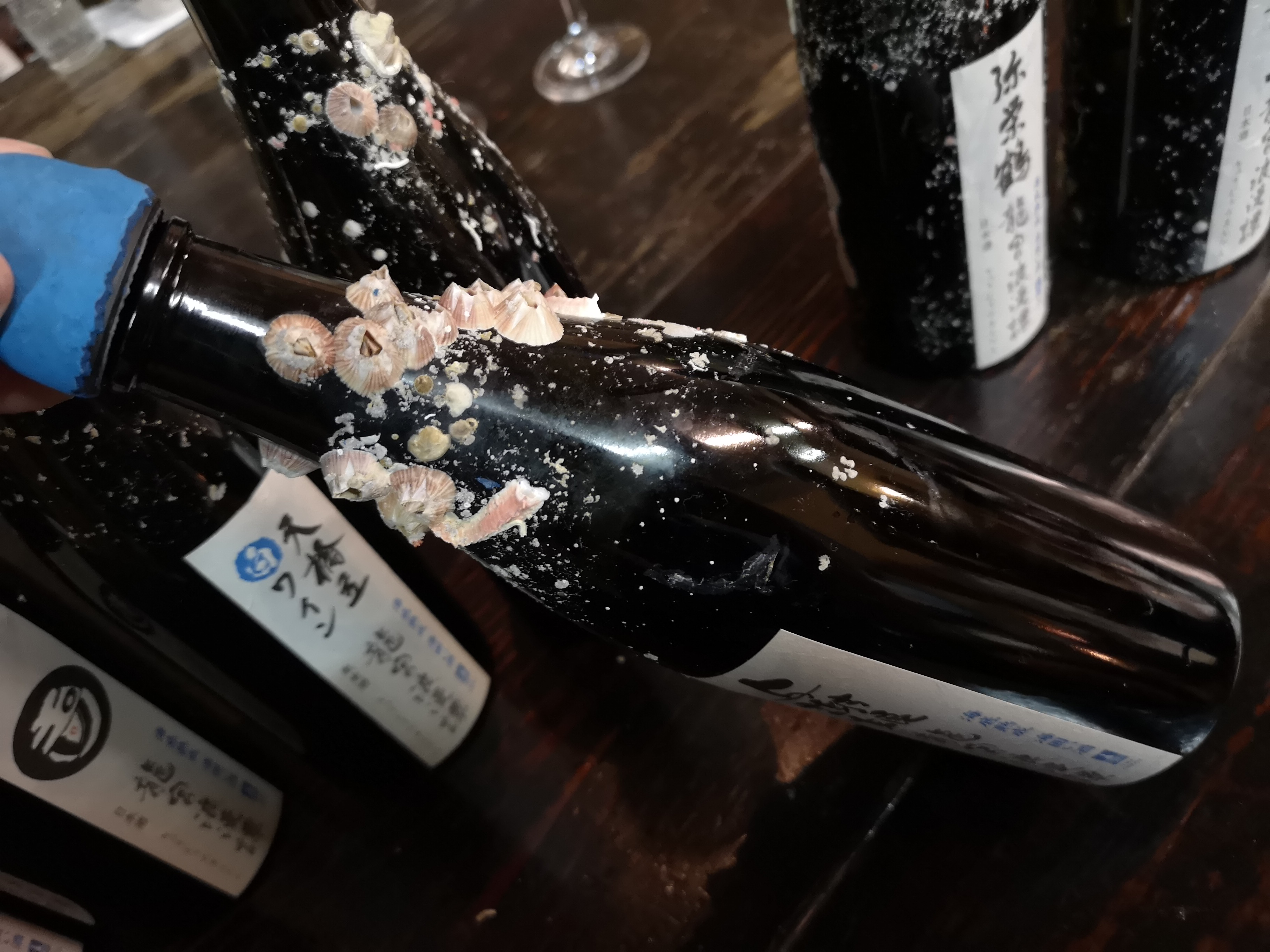 丹後酒梁のプロジェクト「龍宮浪漫譚」。丹後の酒を、琴引浜沖の水深約27ｍの海底で半年間熟成させている。